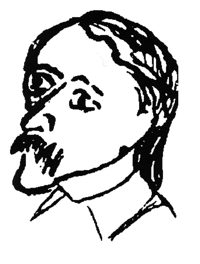 Schriftsteller und Lehrer German Mäurer